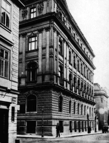 Löw Sanatorium - Mariannengasse 20, 1090 Wien